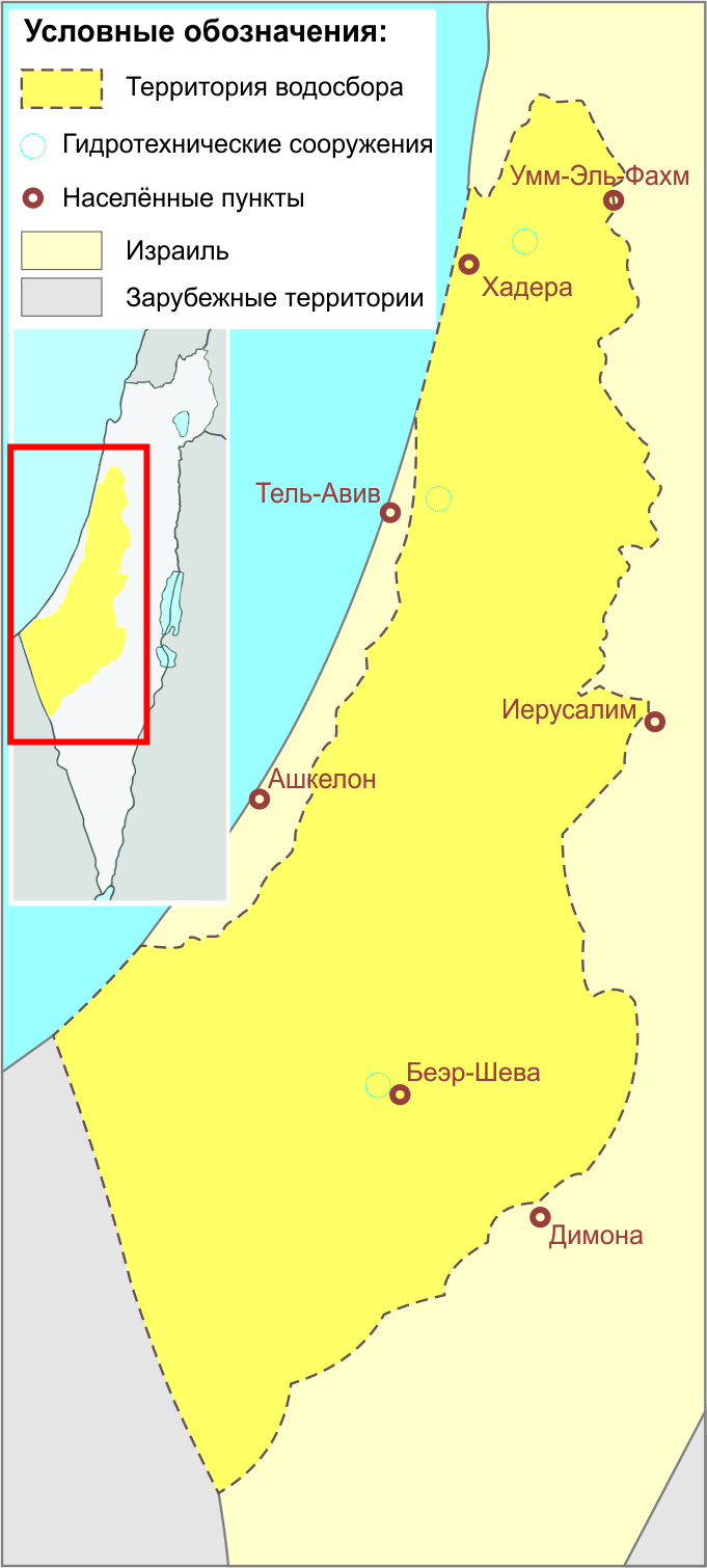 Карта водосборного бассейна Яркон / водные ресурсы государства Израиль